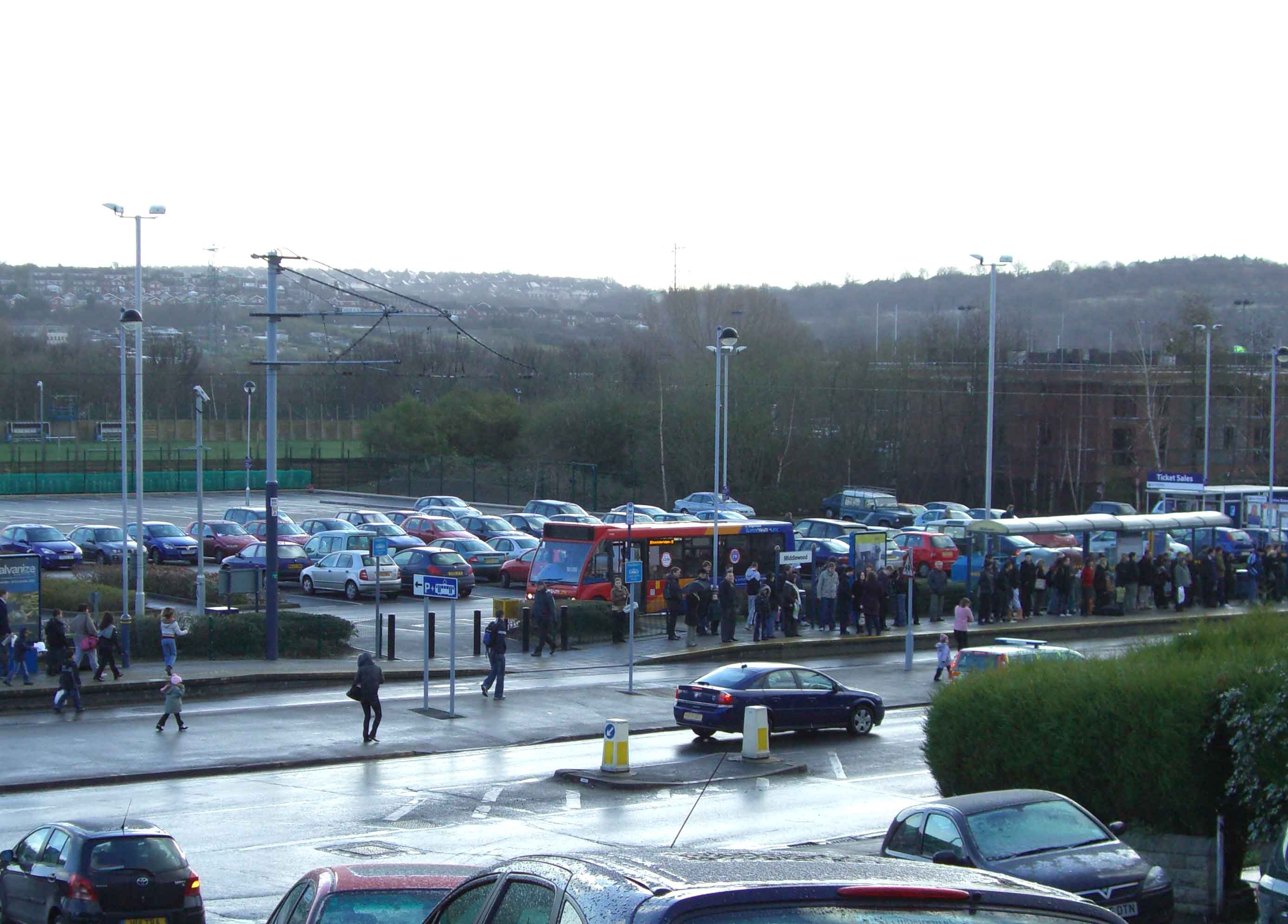 Middlewood Supertram terminus